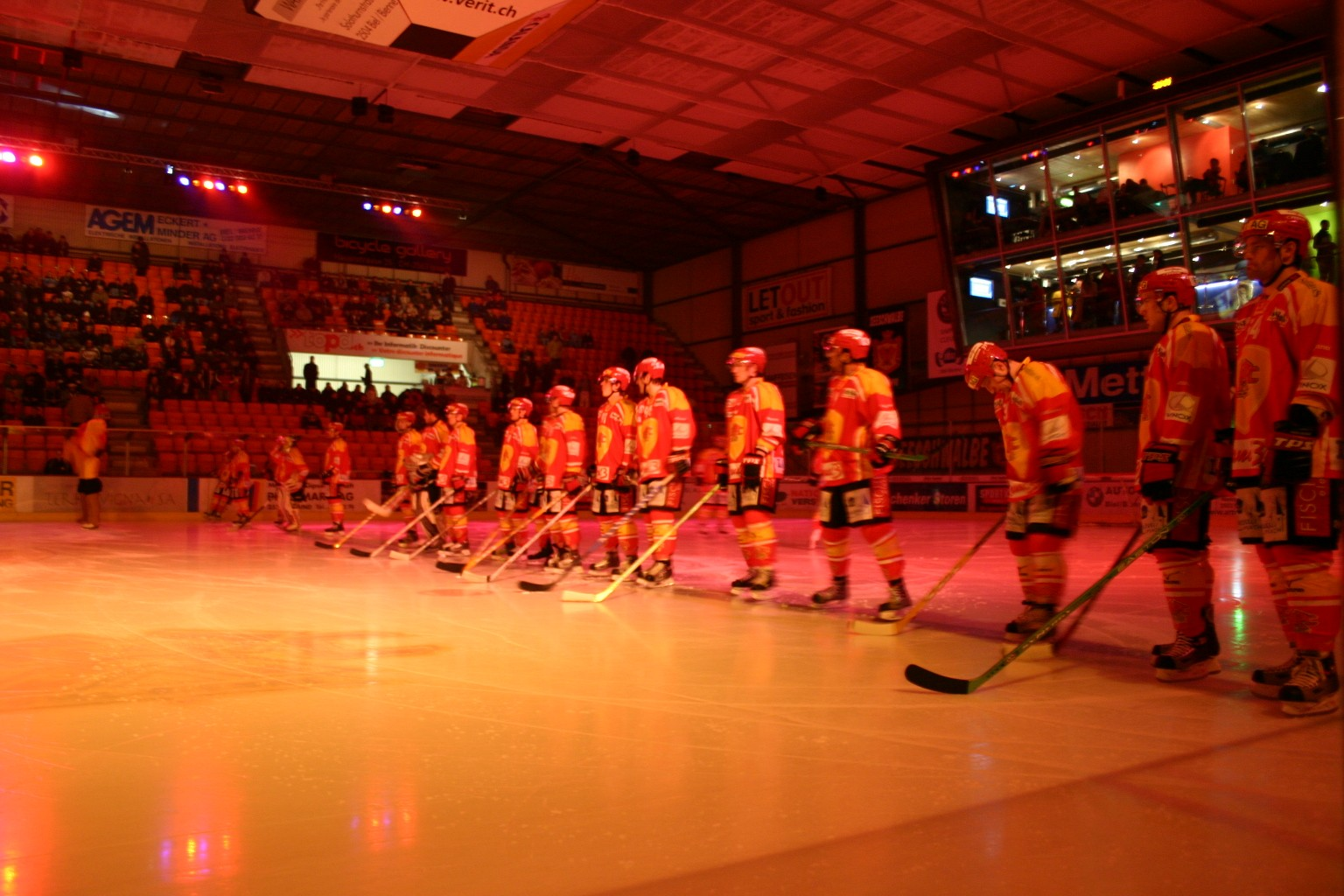 Die Spieler des EHC Biel vor Spielbeginn in der Saison 2005/06